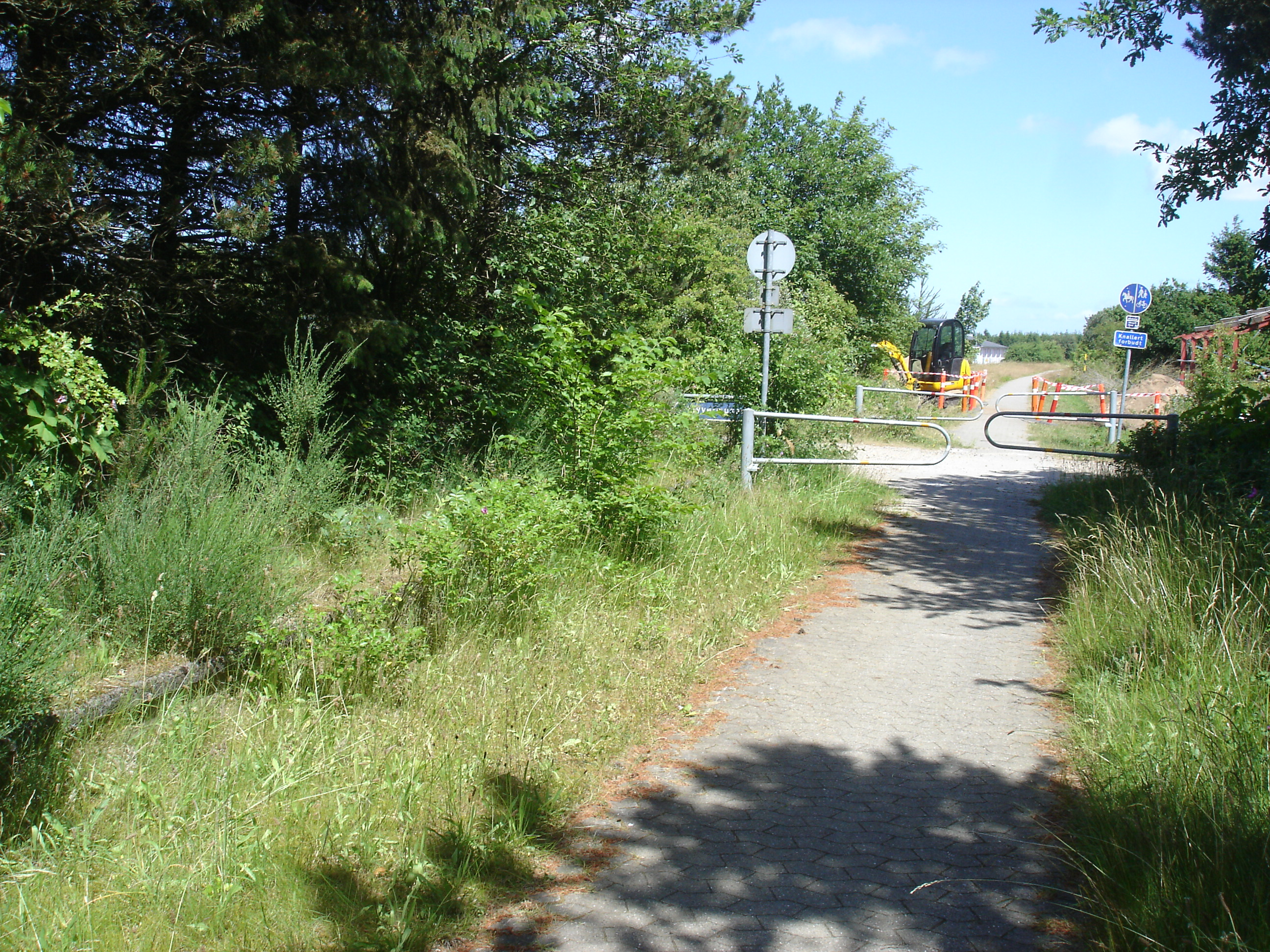 Alhedestien passerer Gedhus trinbræt med perronkant